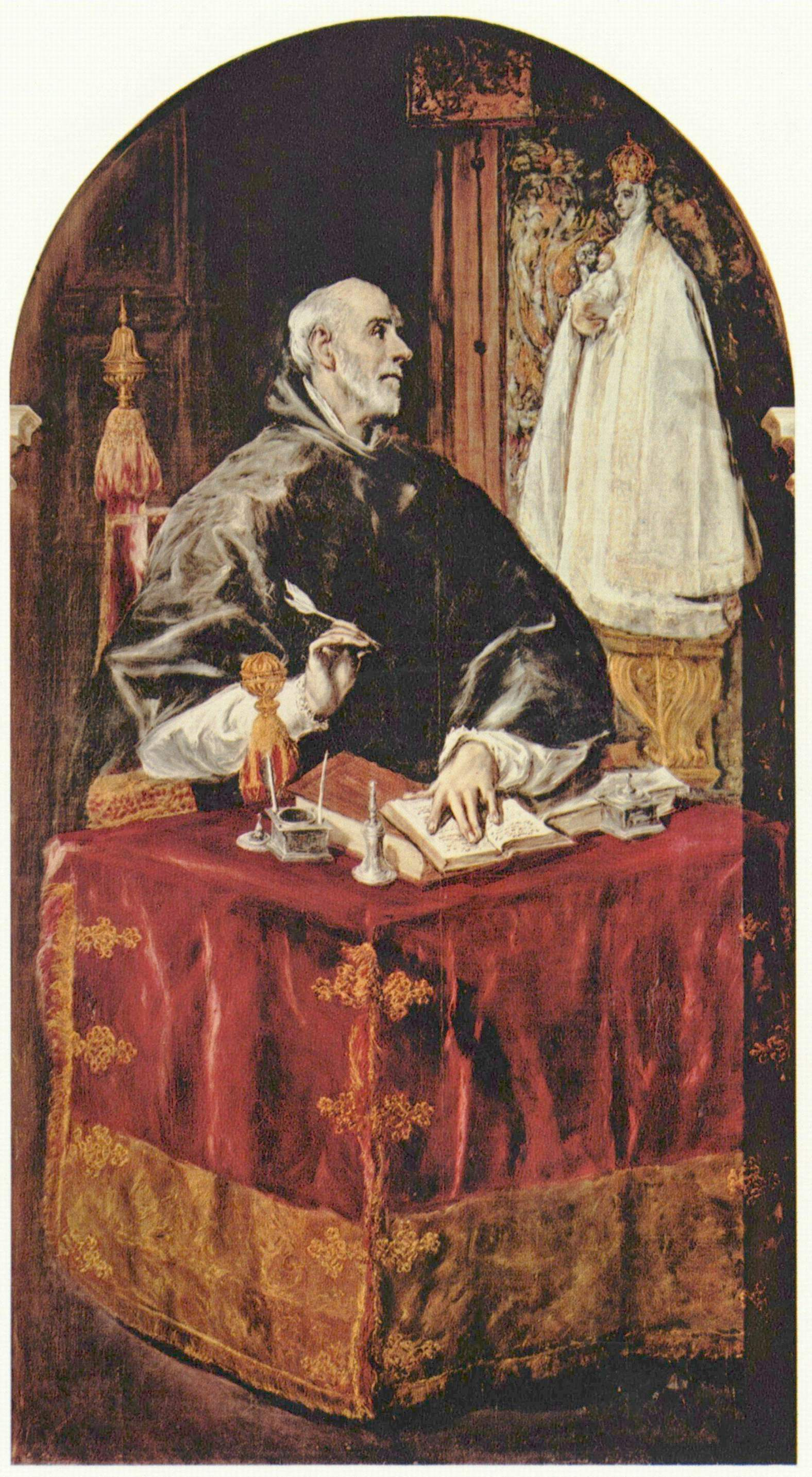 La obra representa al prelado español San Ildefonso de Toledo (607-667), que fue arzobispo de Toledo y era hermano del también arzobispo San Isidoro de Sevilla.